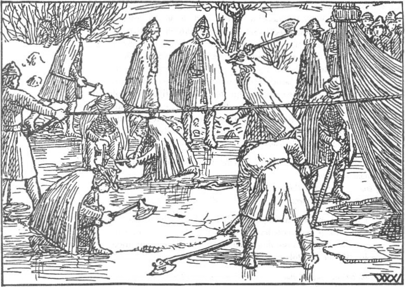 Wilhelm Wetlesen: Illustration for Harald Hardrådes saga, Heimskringla 1899-edition. nn: «Tormod Eindridason gjev Hall Otryggsson banehogg.»